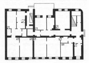 Брэст. План 1-га паверха дома па вуліцы Карла Маркса, 11